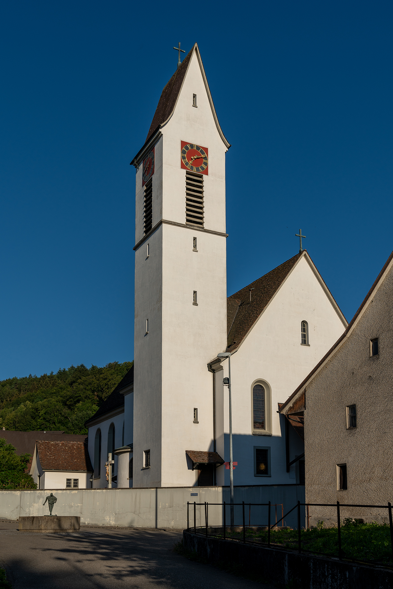 Römisch-katholische Kirche St. Agatha in Zeiningen (AG)